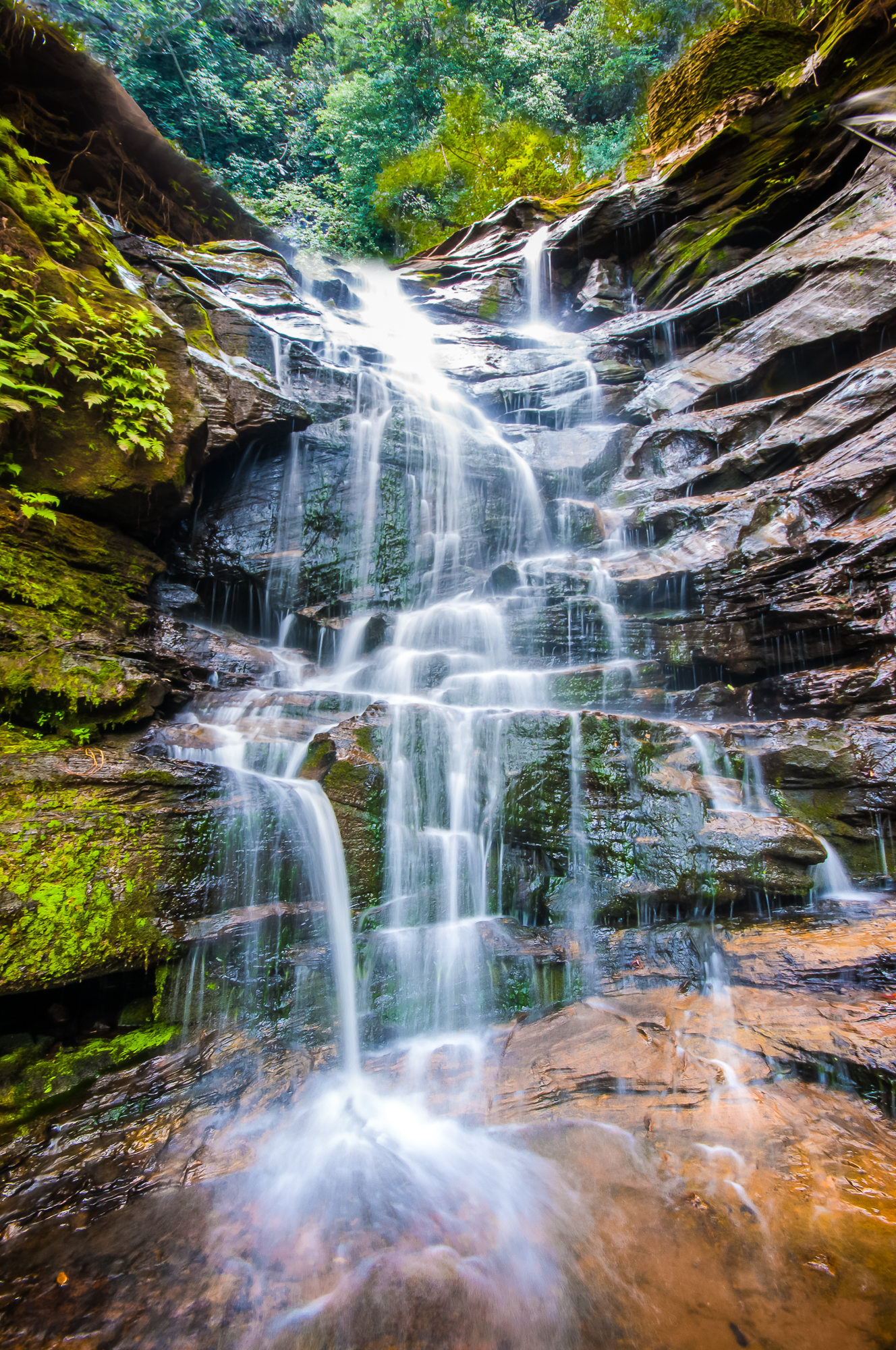 Chapada das Mesas - MA